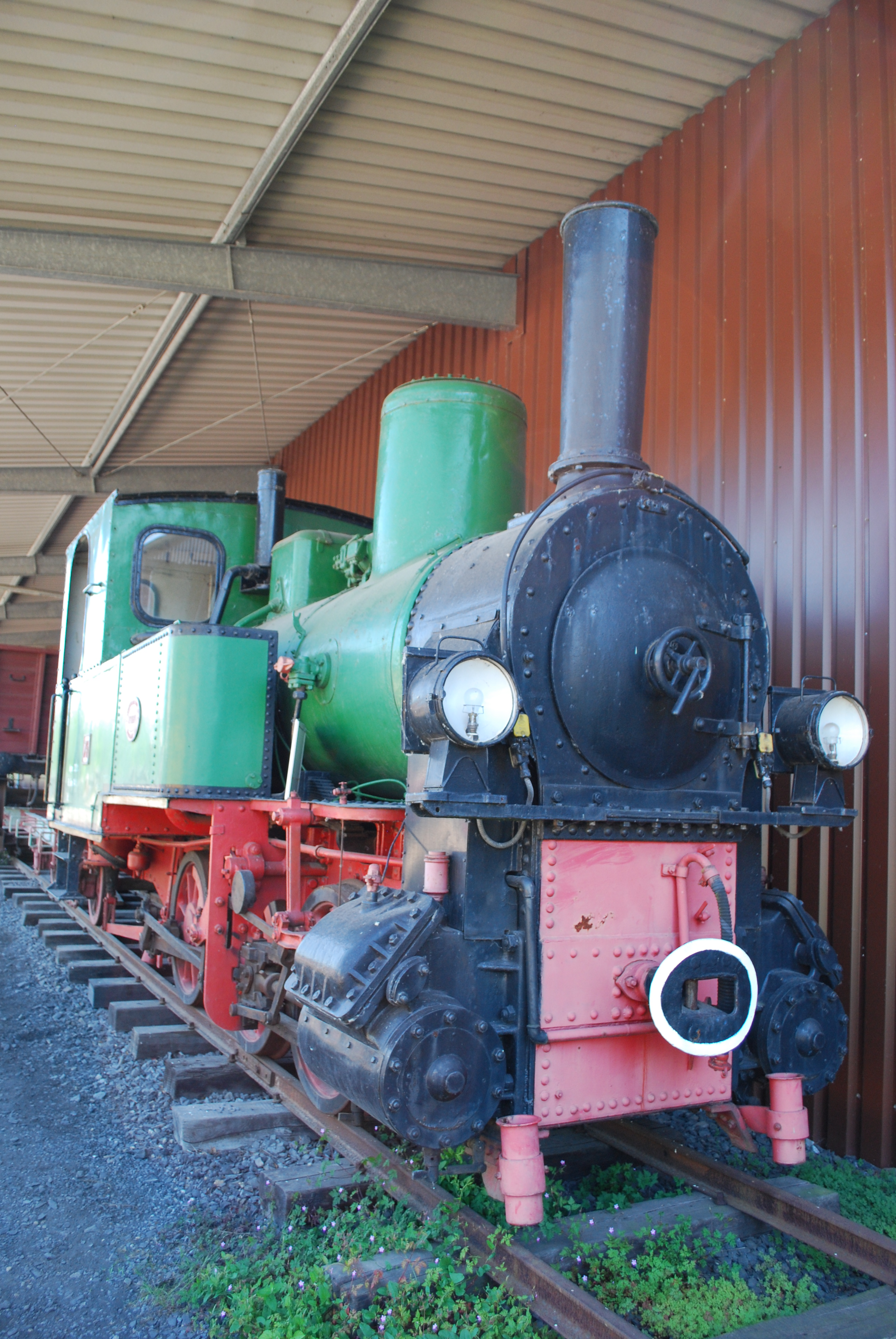 Meter gauge Obere Weisentalbahn 0-6-0T built by Krauss, Works No. 2024, in 1888. The OE became part of the Suddeutsche Eisenbahngesellschaft (SEG) in 1938 and the Mittelbadische Eisenbahnen Gesellschaft (MEG) in 1953, at Bochum Dalhausen Museum Depot.